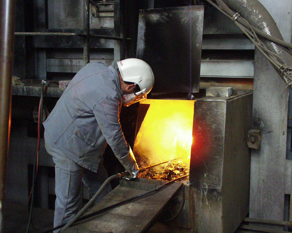 Schlackenabstich am Contop(R)-Ofen